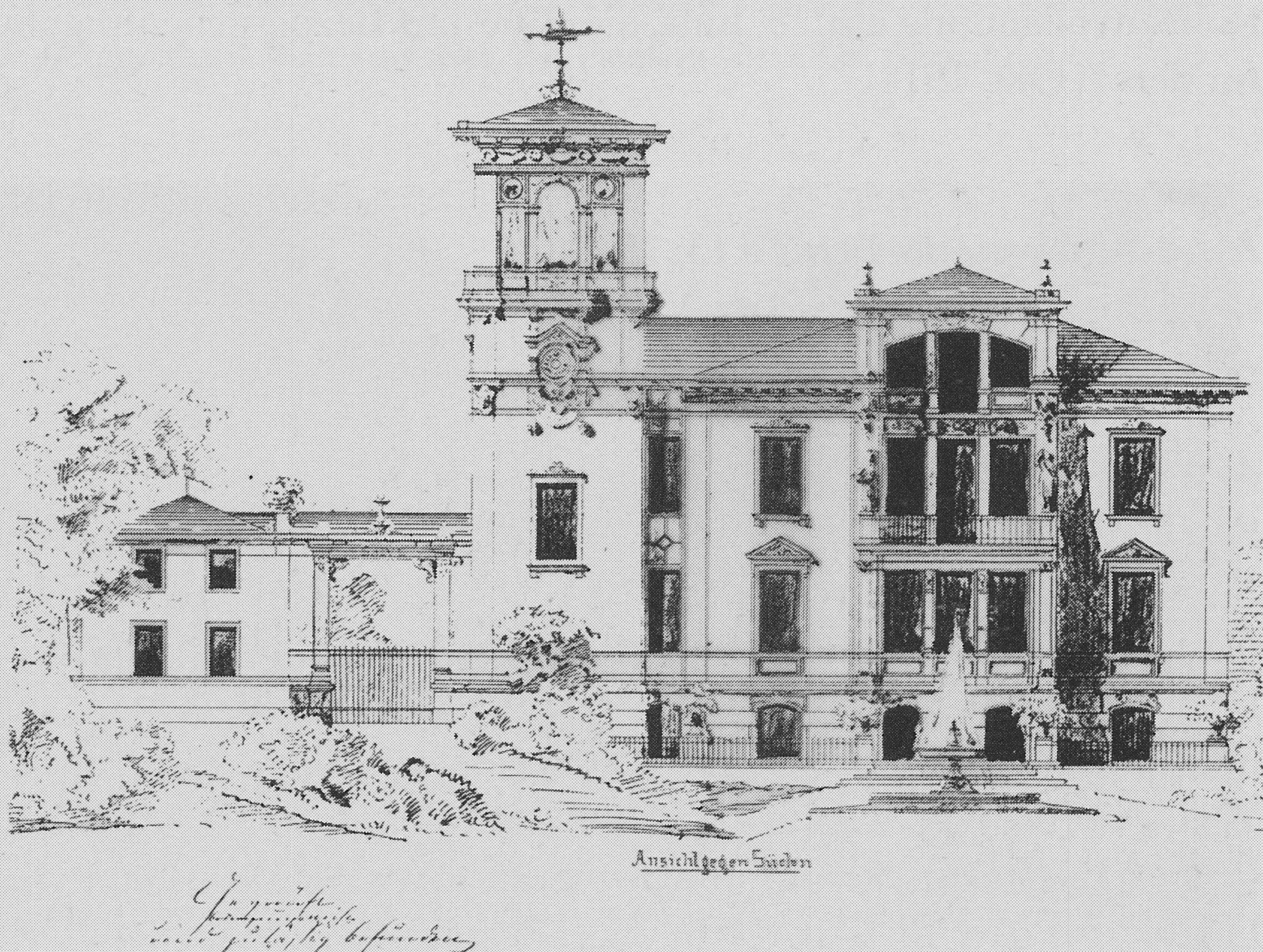 Radebeul, Planzeichnung vor 1875 der Gebrüder Ziller, nicht umgesetzt für einen Ersatz von Winzerhaus Barth. Gespiegelt umgesetzt für die Villa Trinkl in Dresden